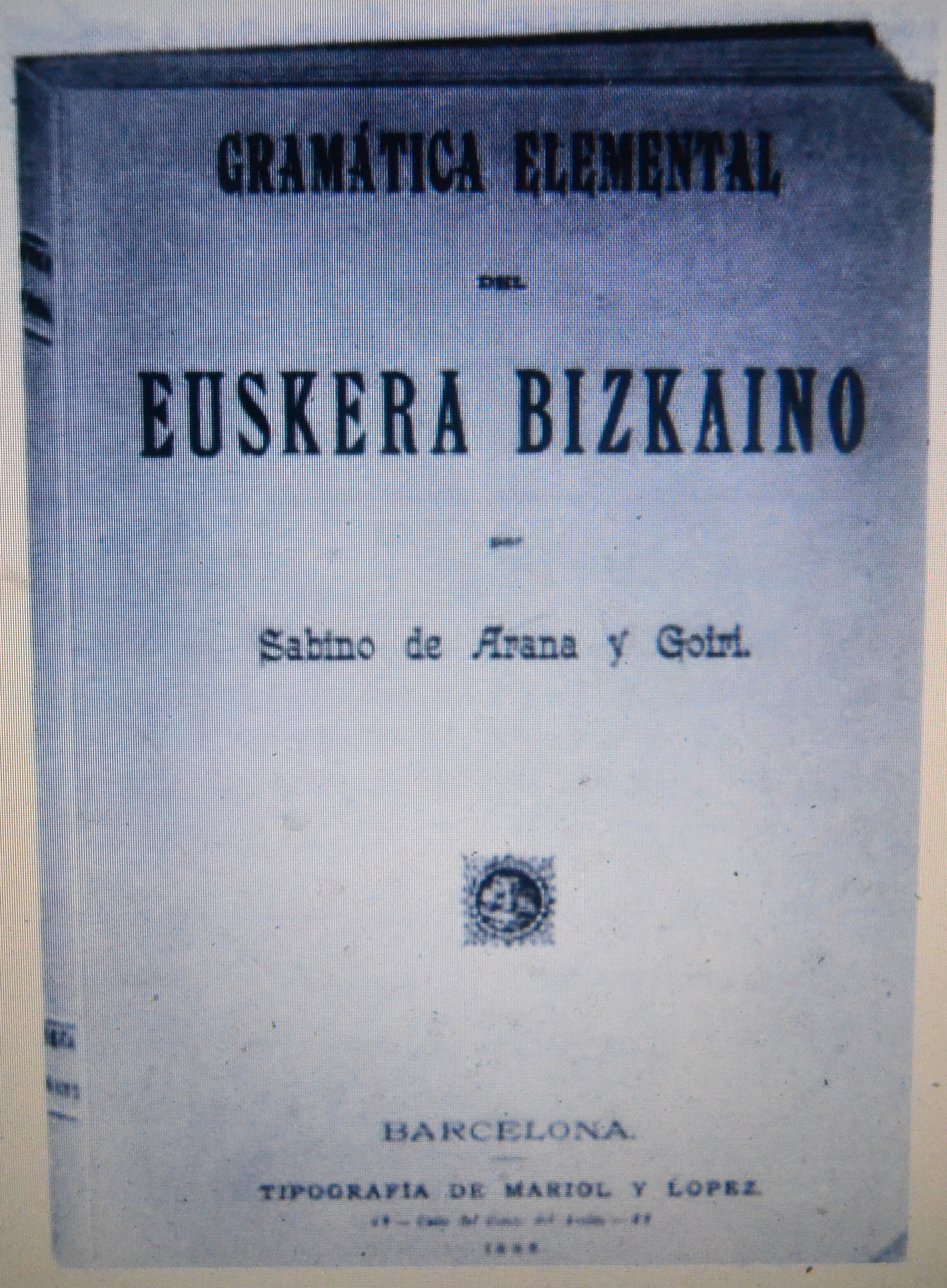 Sabin Arana Goirik argitaratutako Bizkaieraren Oinarrizko Gramatika. Bartzelona, 1888. - The Basic Grammar of Biscaine dialect of Basque Language. Writed by Sabino Arana Goiri. Edited in Barcelona, 1888.